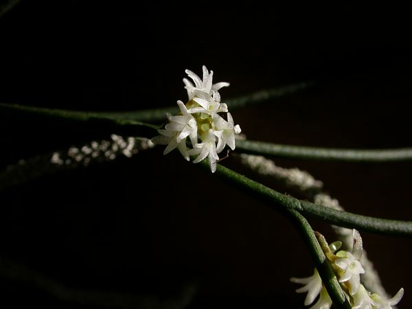 Campylocentrum parahybunense - Minas Gerais